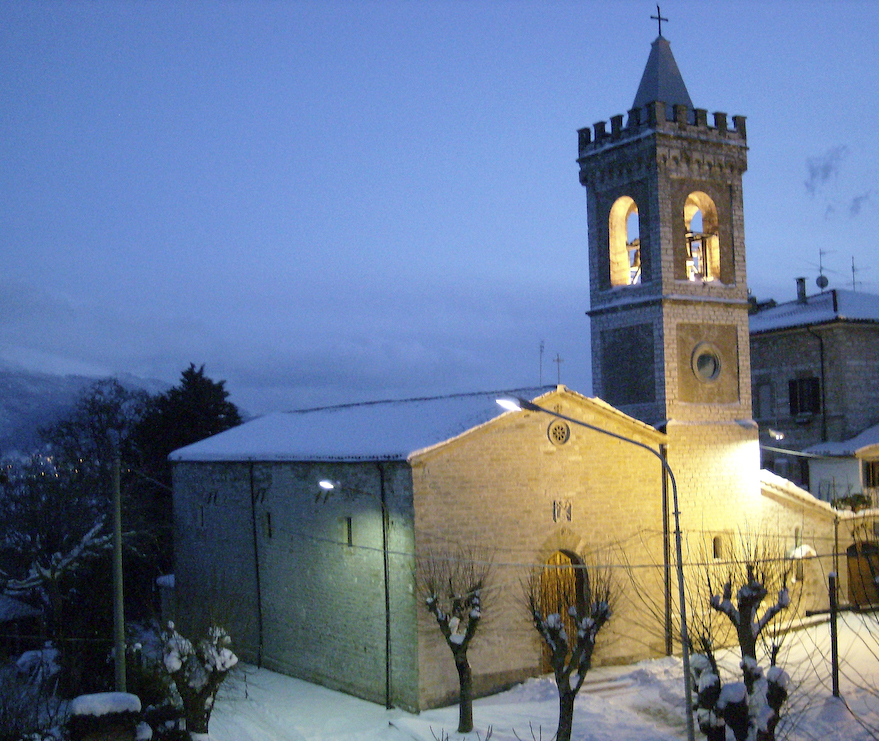 Chiesa romanica di San Pellegrino, Gualdo Tadino, PG, ITALY